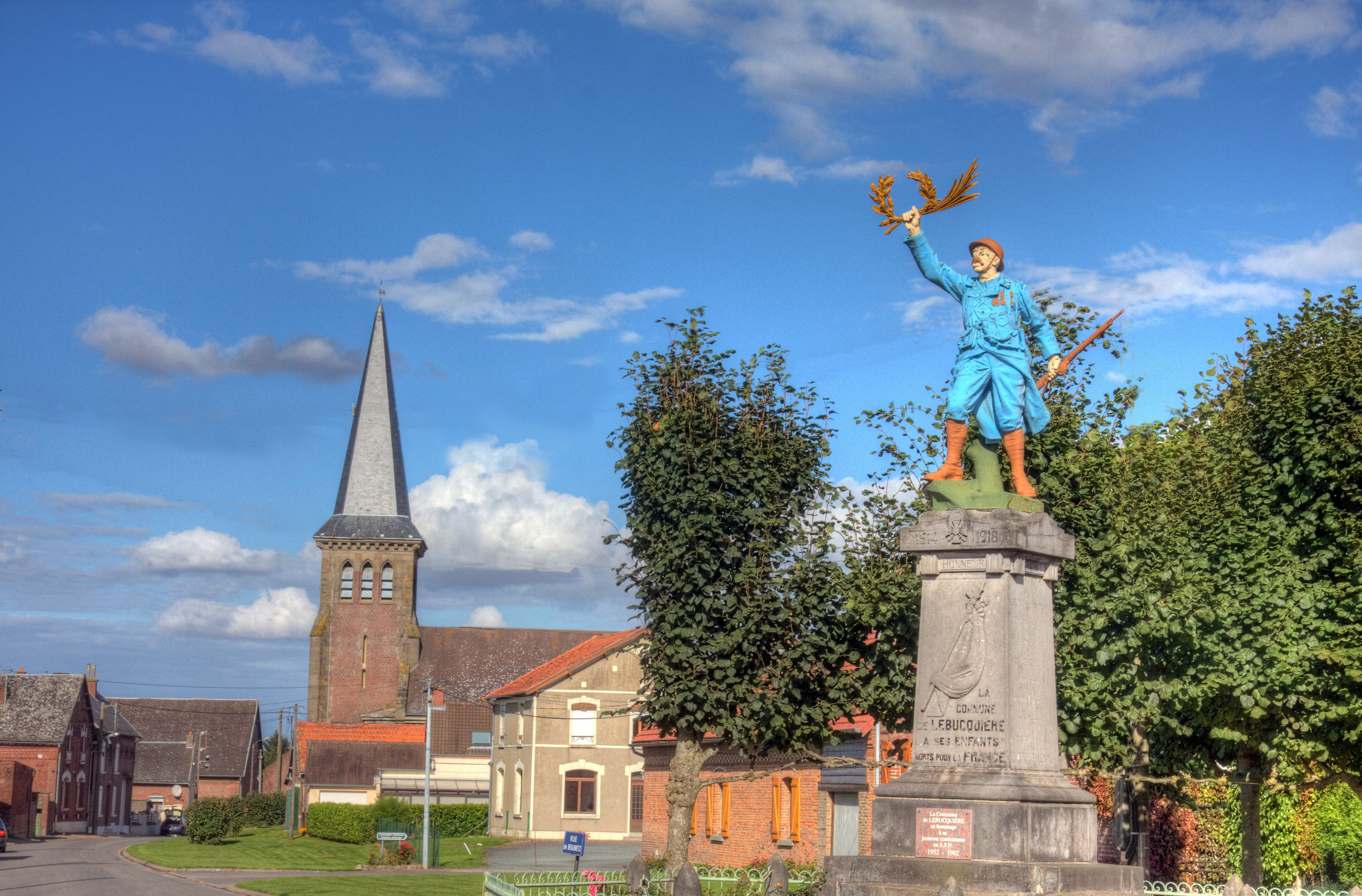 Le centre de Lebucquière